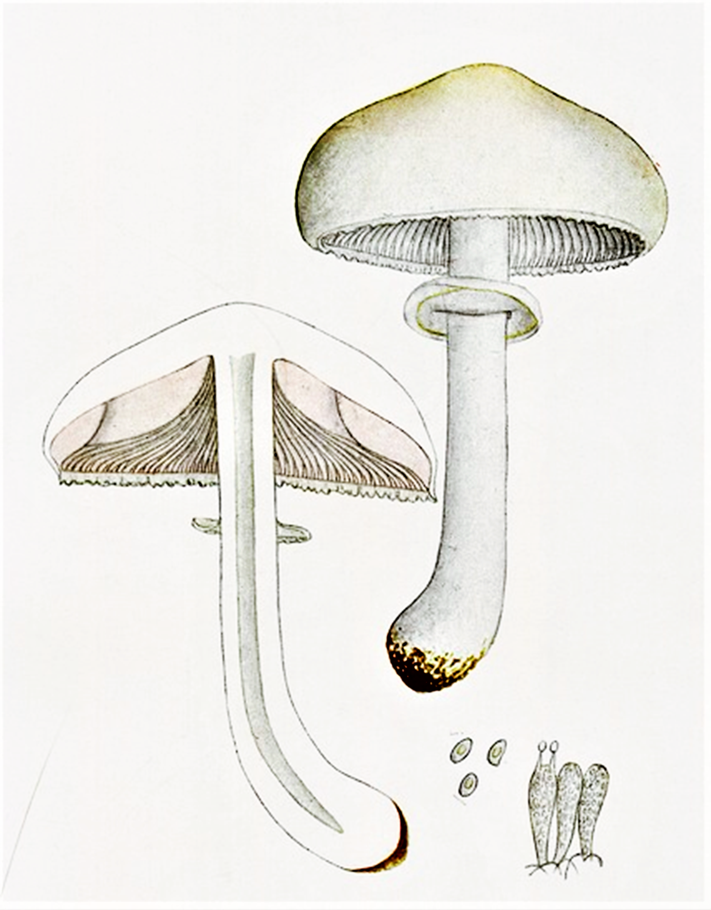 Giacomo Bresadola: Lepiota naucina P.Kumm. (1871), heute Leucoagaricus leucothites (Vittad., 1835) Wasser (1977)